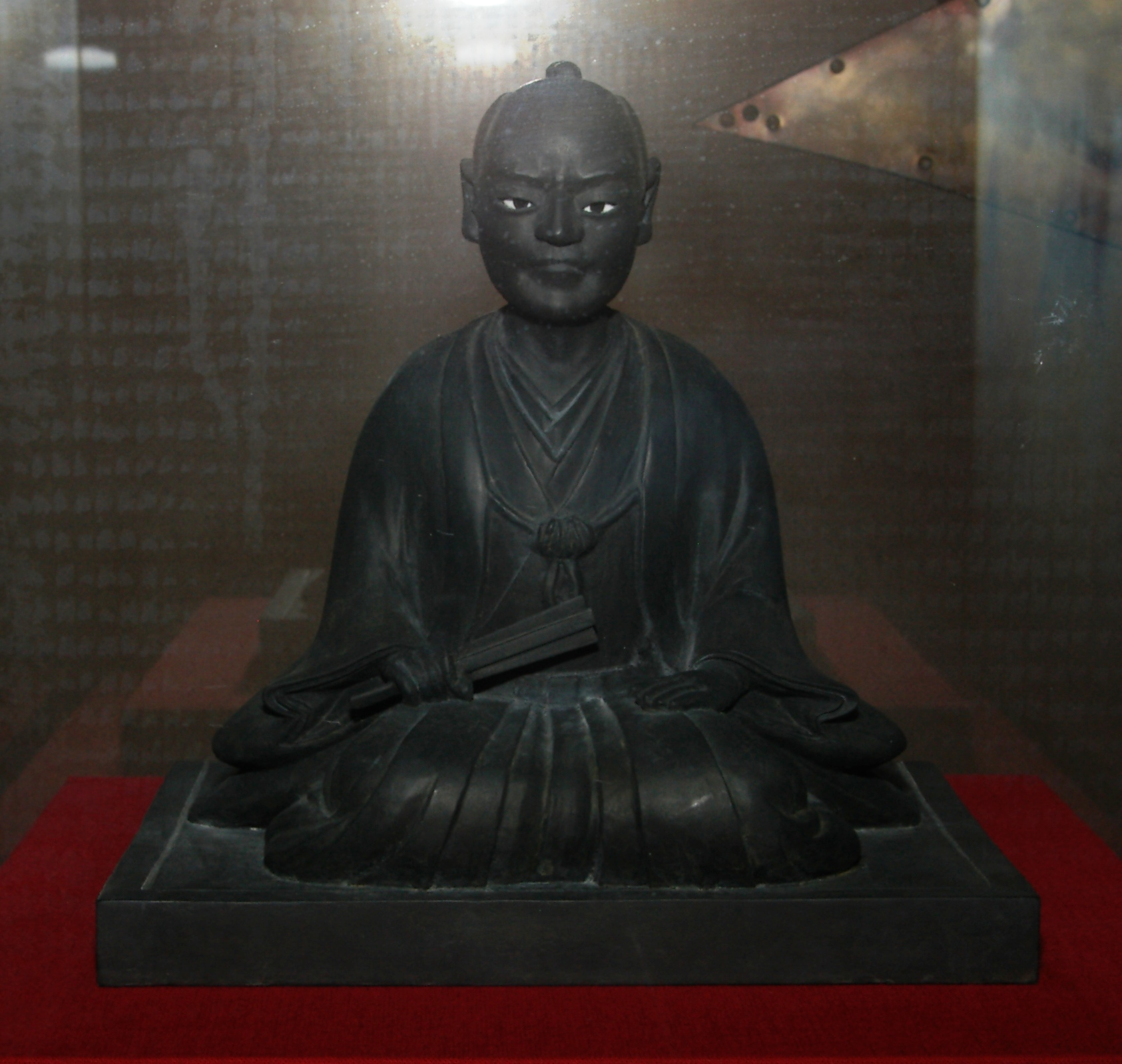 貞享義民記念館展示の多田加助座像